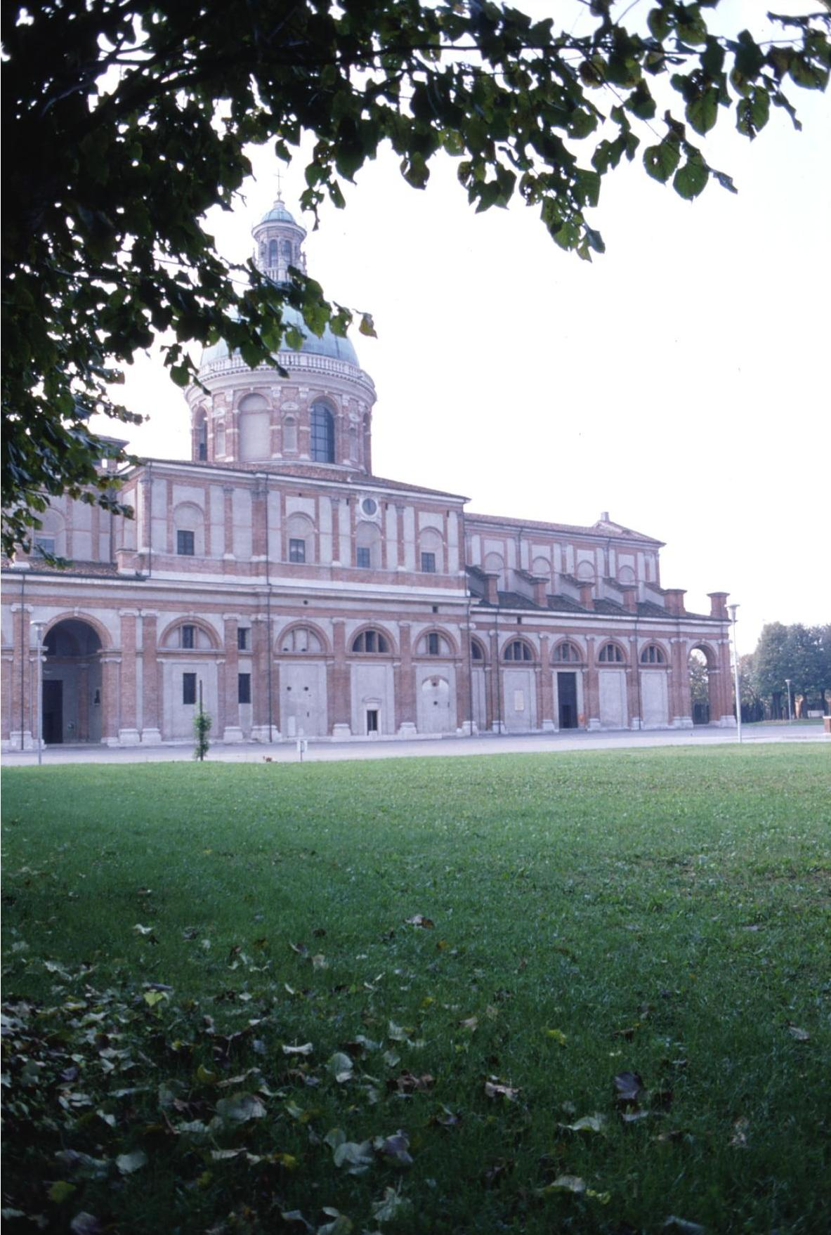 Il Santuario di Caravaggio, in Lombardia, visto dal porticato interno dell'edificio. The Sanctuary of Caravaggio, in Lombardy, as seen from the surrounding porticos.